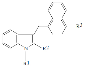 Нафтилметилиндолы